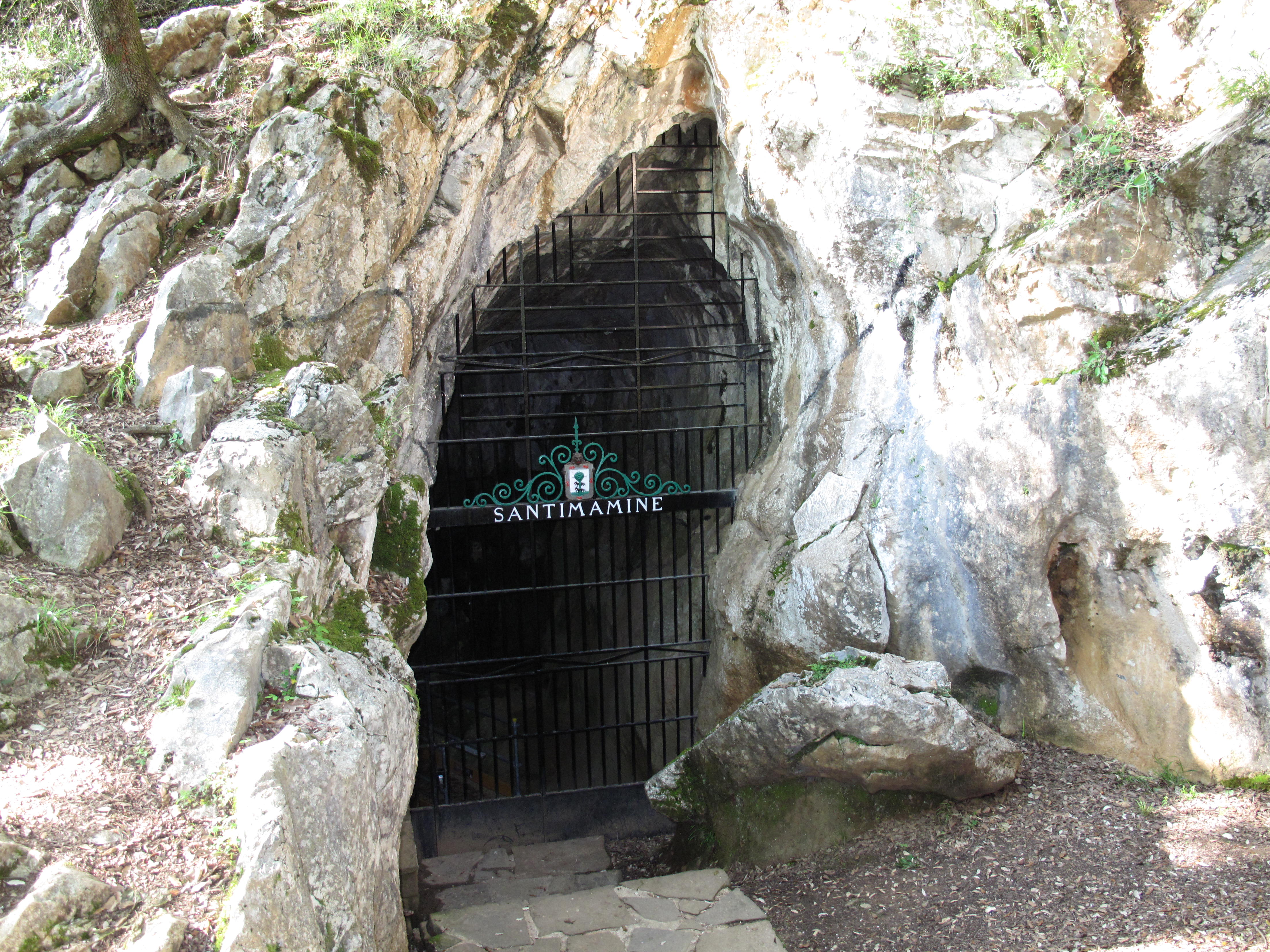 Entrada de cueva de Santimañiñe en Kortezubi, Vizcaya, Spain